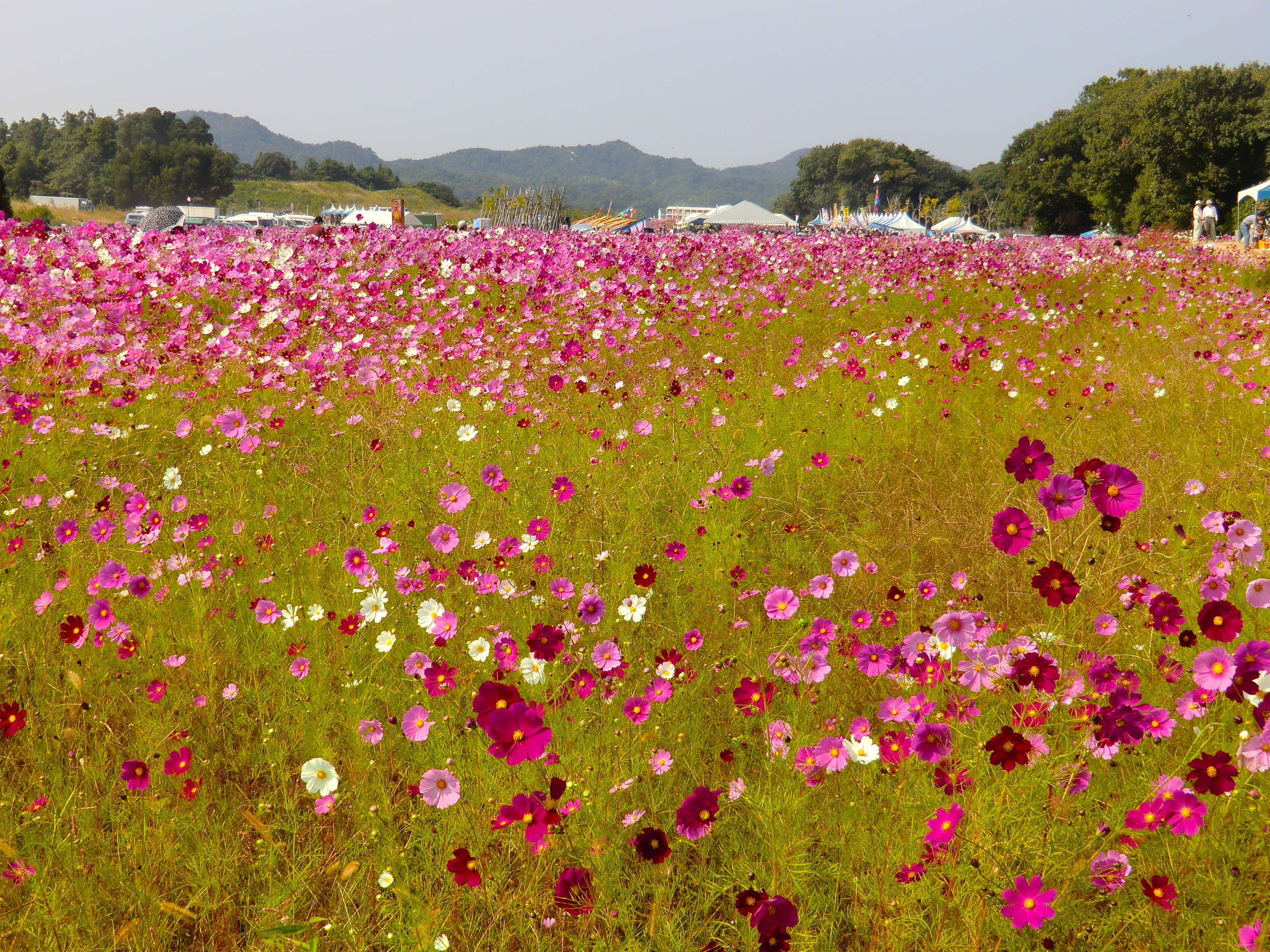 リフレッシュパーク豊浦のコスモス